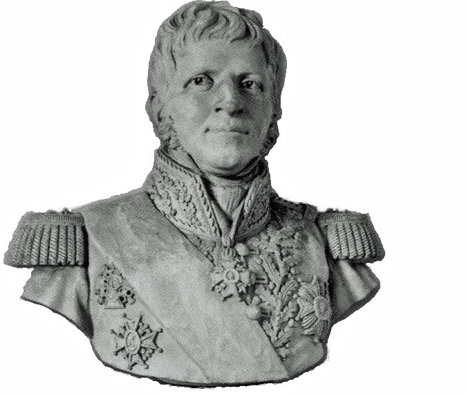 Louis Tirlet, buste de Trouillot en 1894.